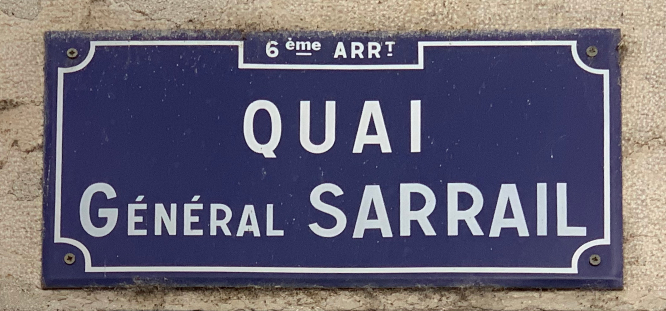 Quai Général Sarrail (Lyon).